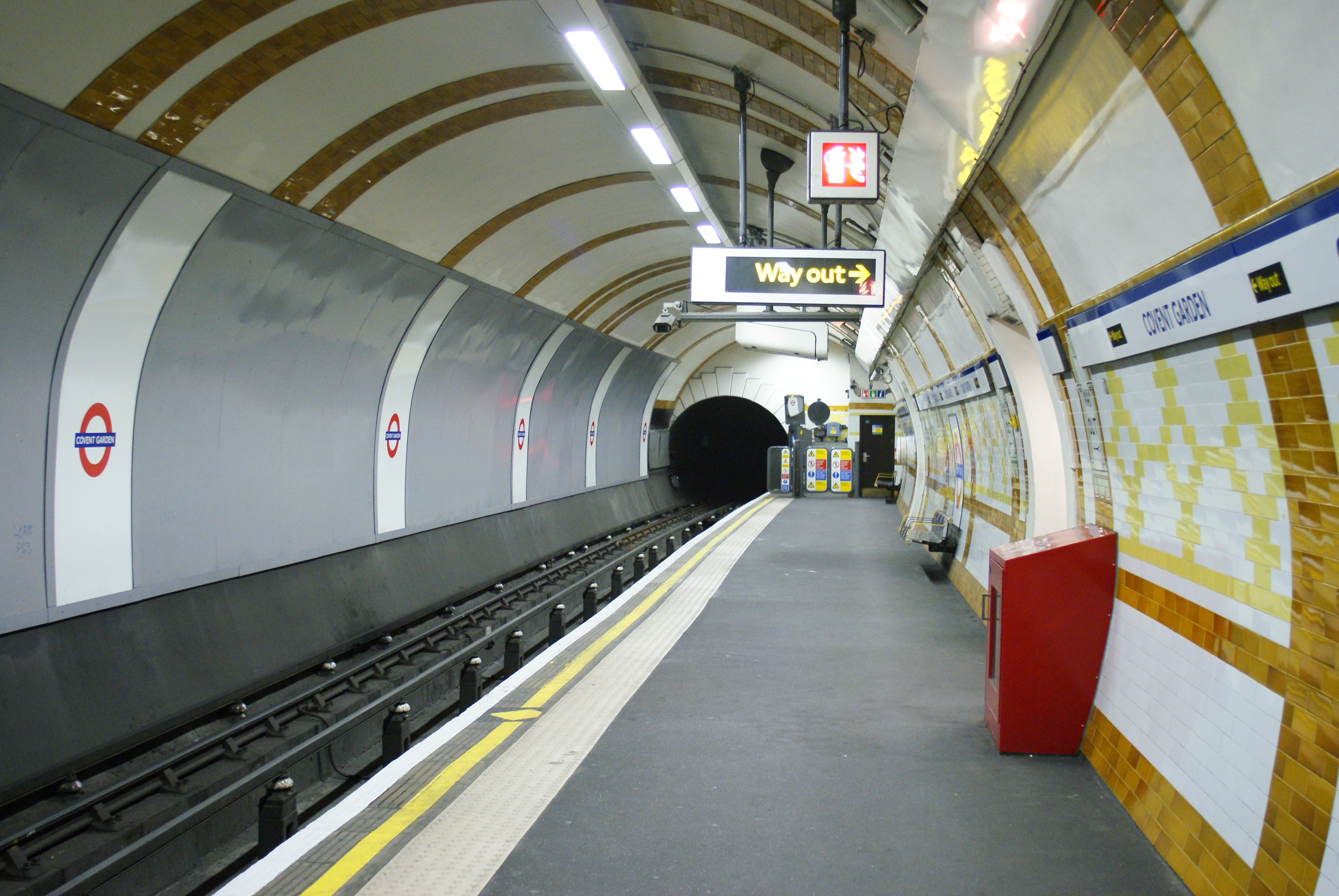 COVENT GARDEN-3 020909 CPS